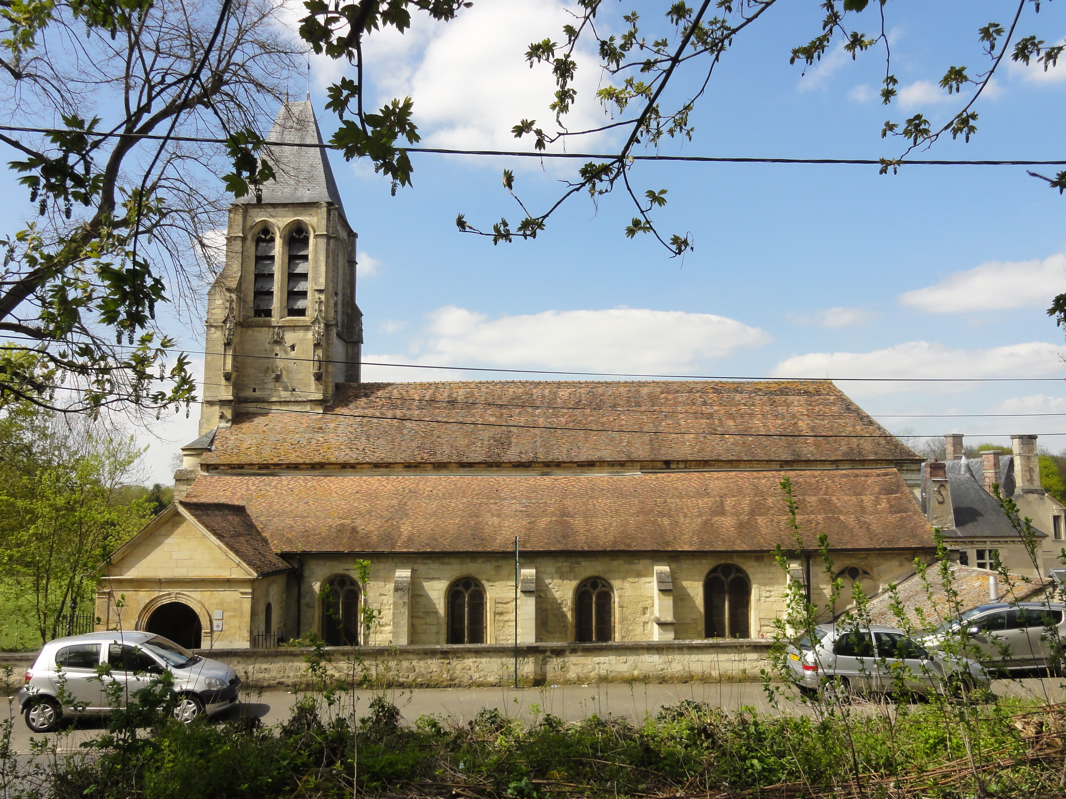 Église Saint-Denis de Méry-sur-Oise - voir titre.